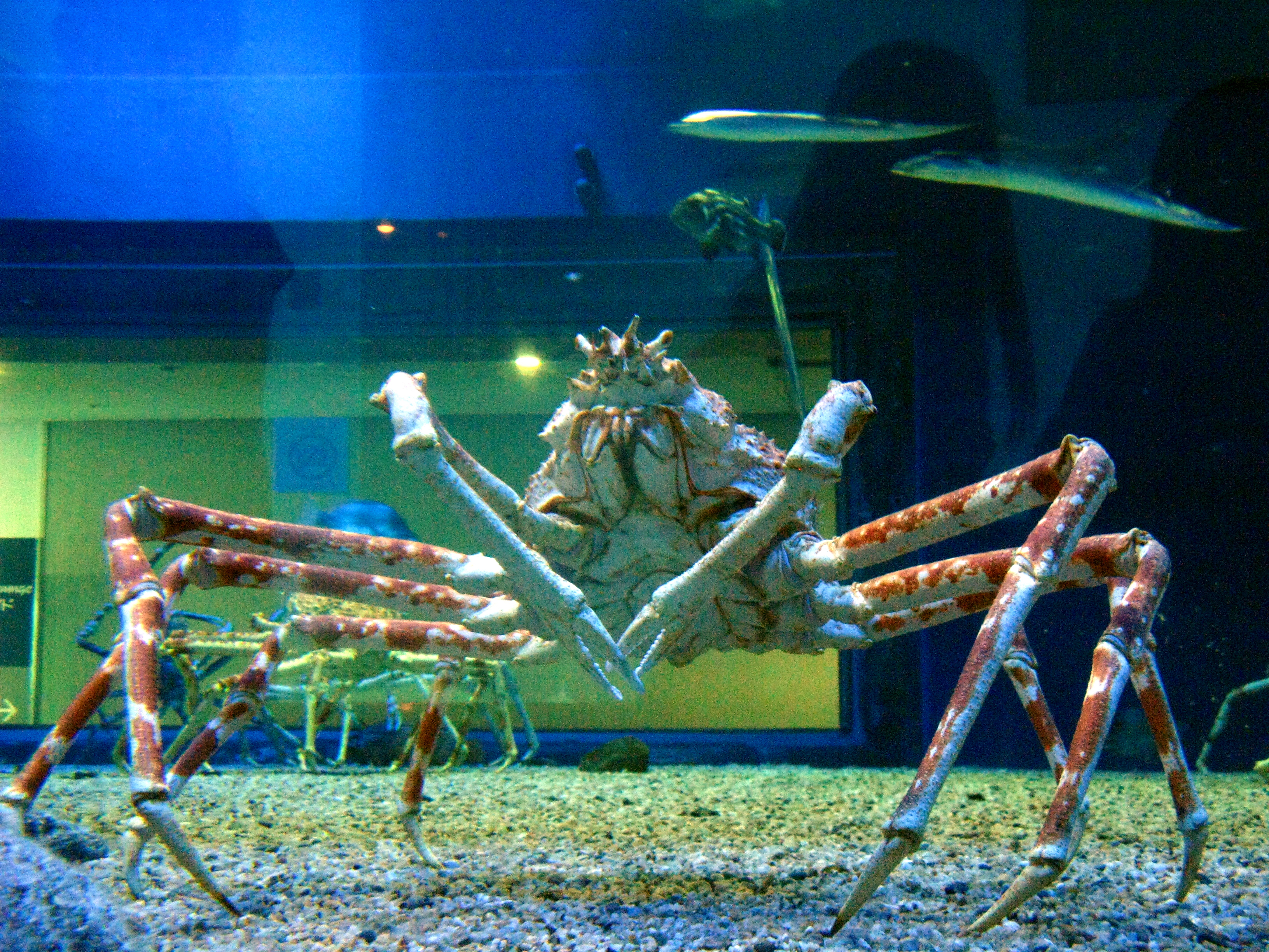 Scientific name Macrocheira kaempferi